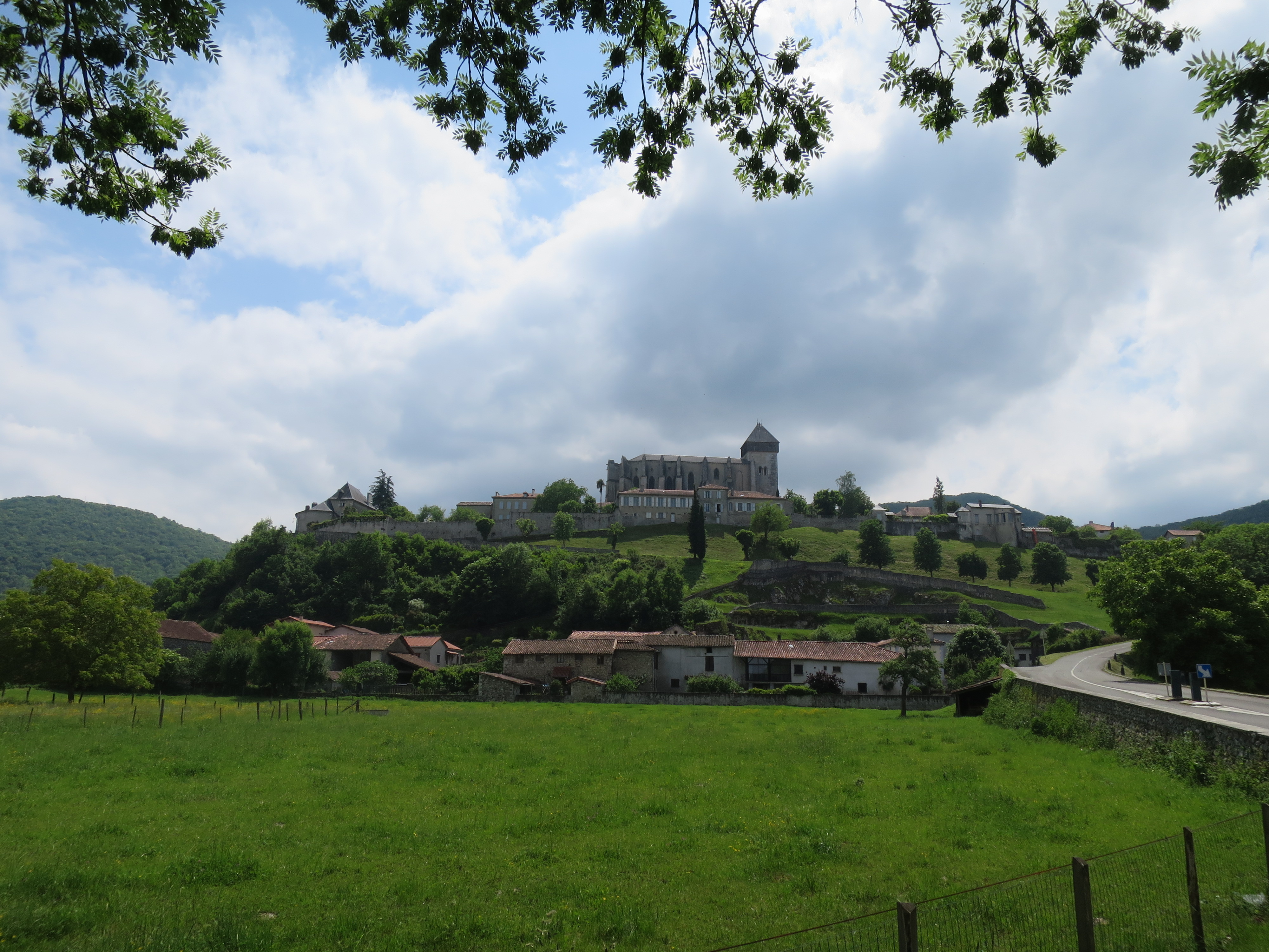 Cathédrale Notre-Dame de Saint-Bertrand-de-Comminges